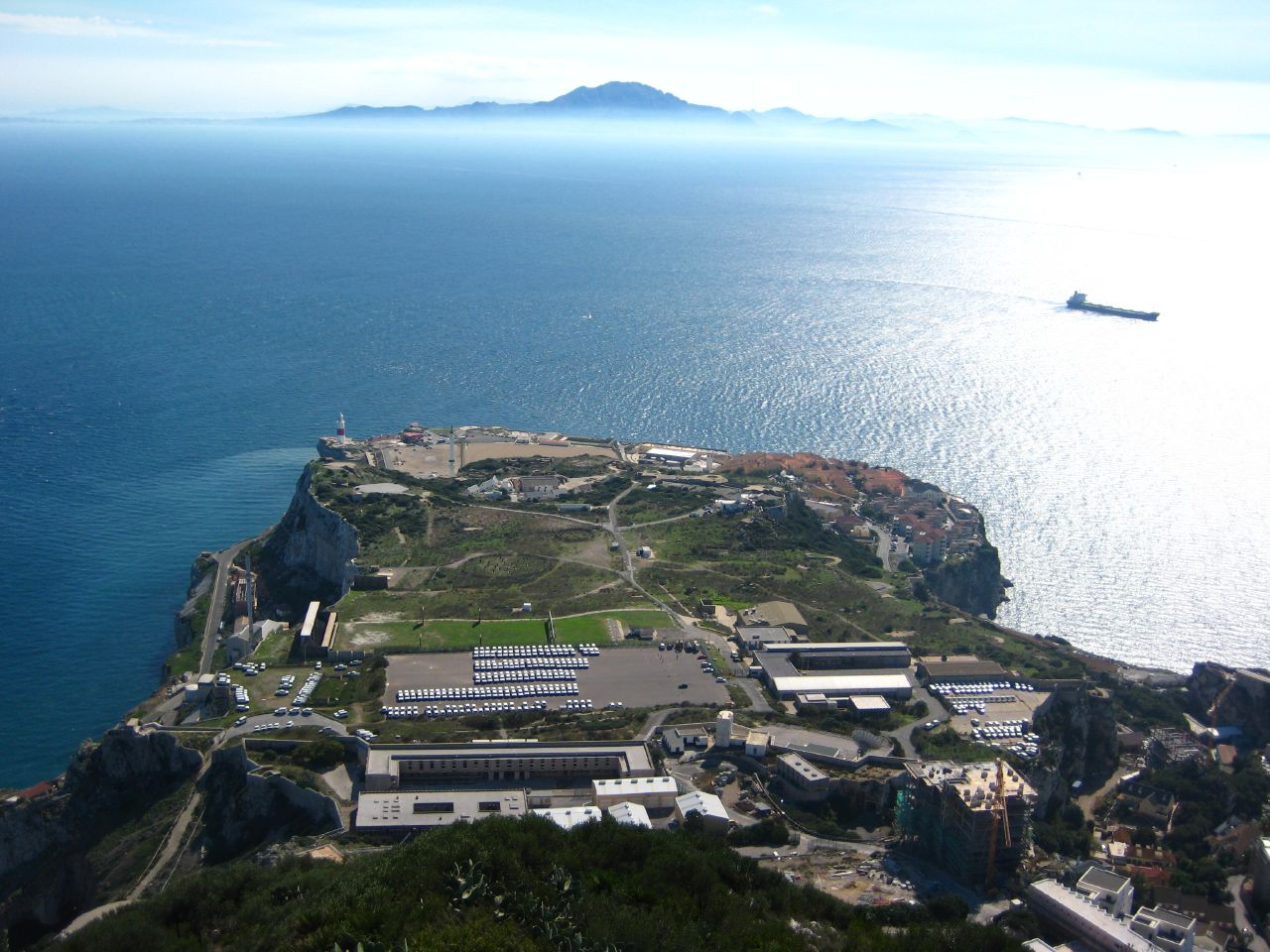 Gibraltar, Africa